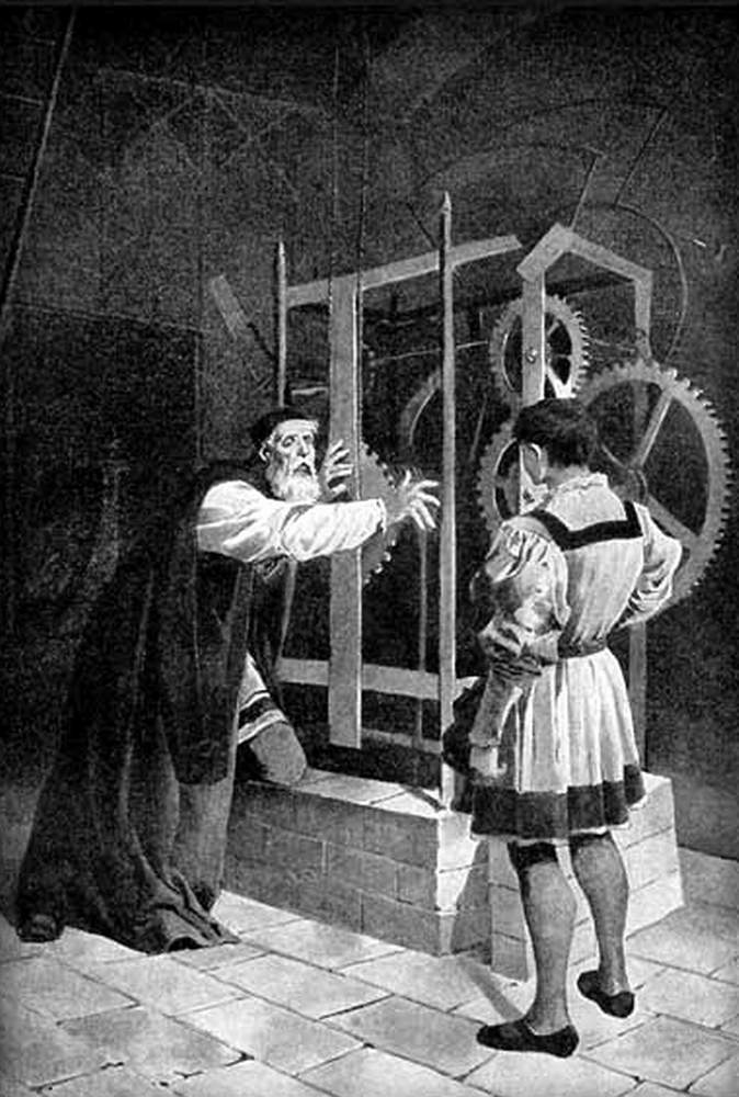 Meister Hanuš, Zeichnung ca. 1900